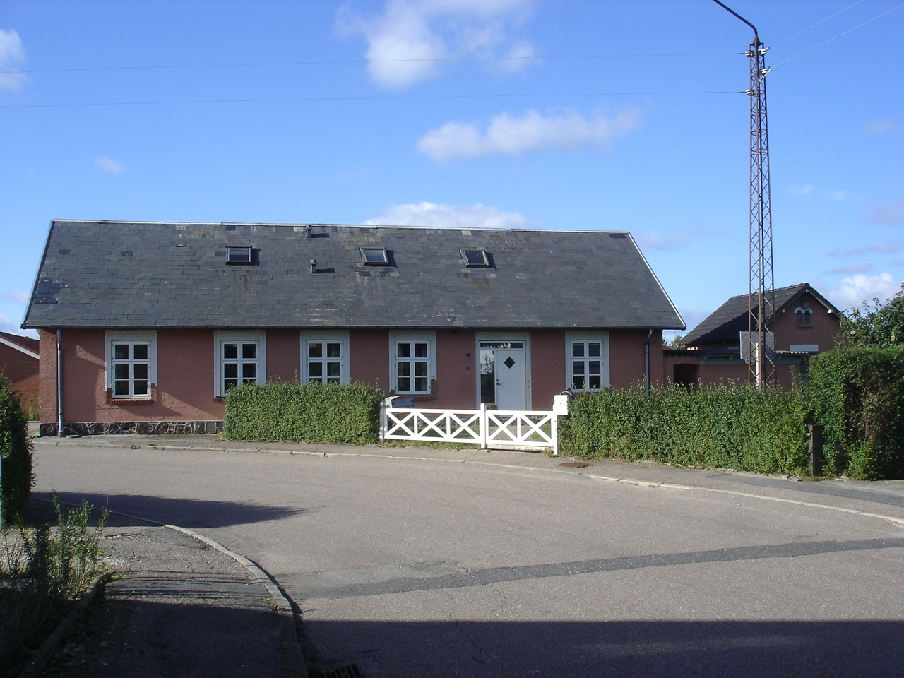 Uldum Station fra vejsiden